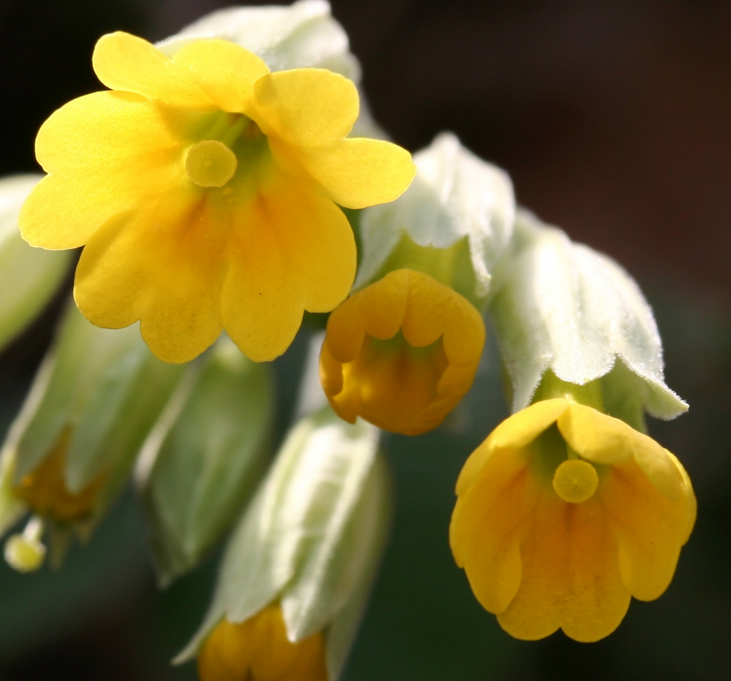 Primula_veris (Primula odorosa) Località : Pellegai, Mel (BL), 503 m s.l.m.